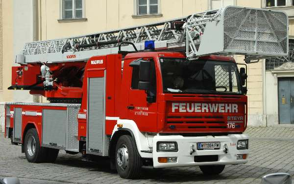 Fahrzeug (Steyr NMK) der Wiener Berufsfeuerwehr